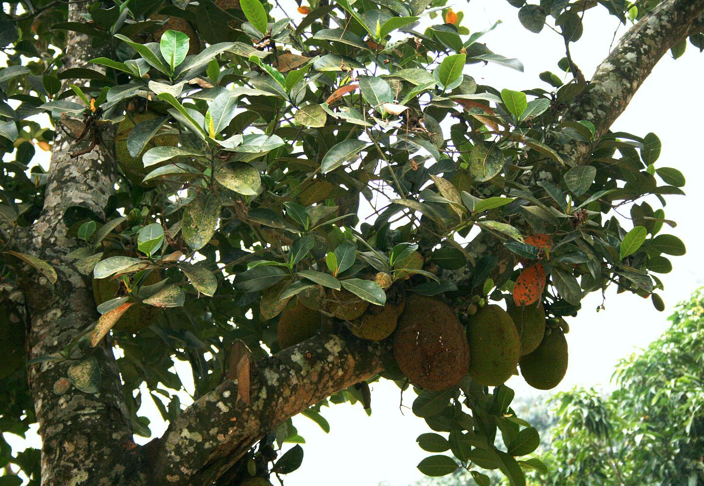 Artocarpus heterophyllus, Maulbeergewächse (Moraceae) - Vietnam/Việt Nam: Mường So E Phong Thổ (Prov. Lai Châu)